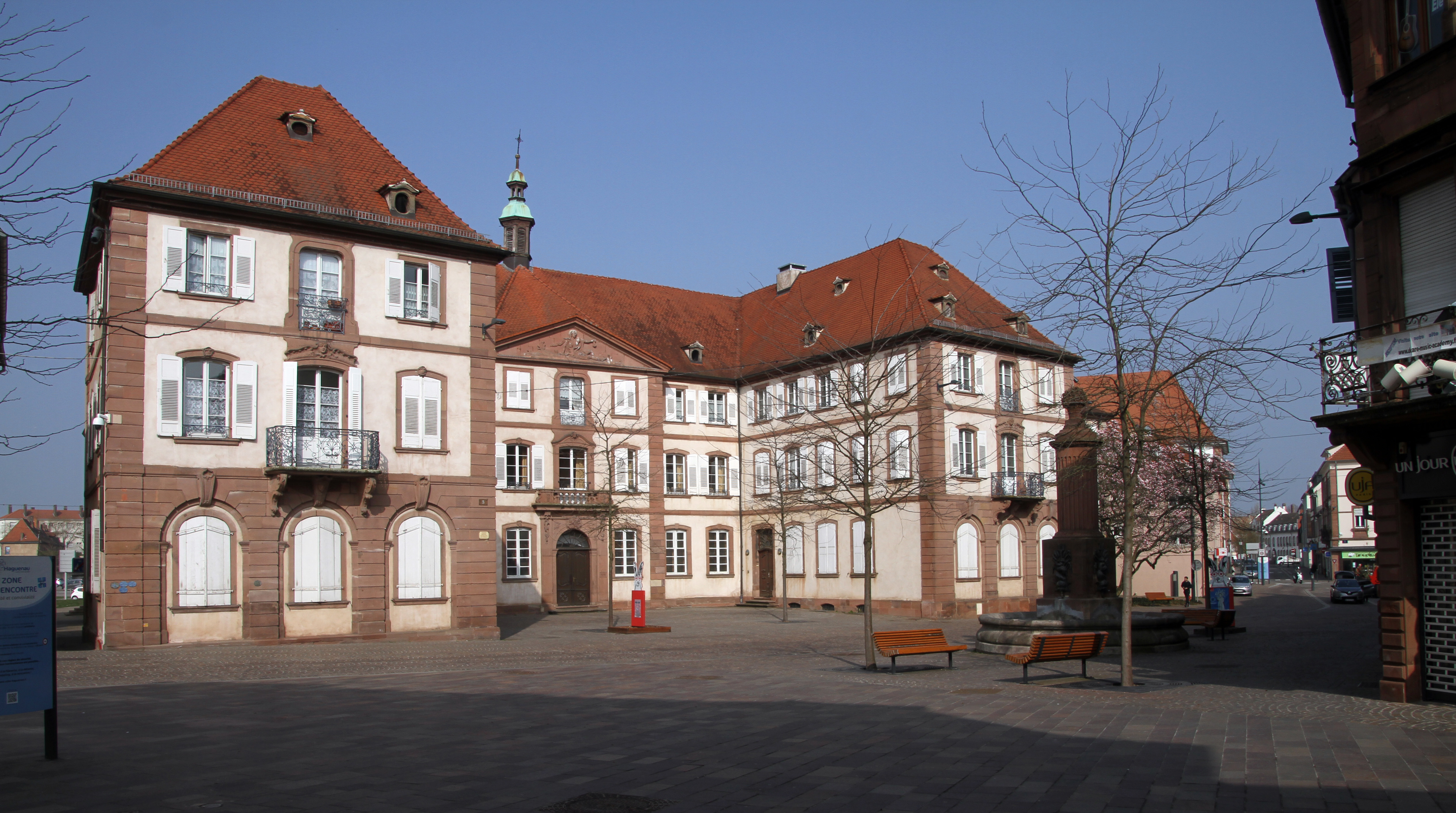 Hôpital Saint-Martin (Haguenau)